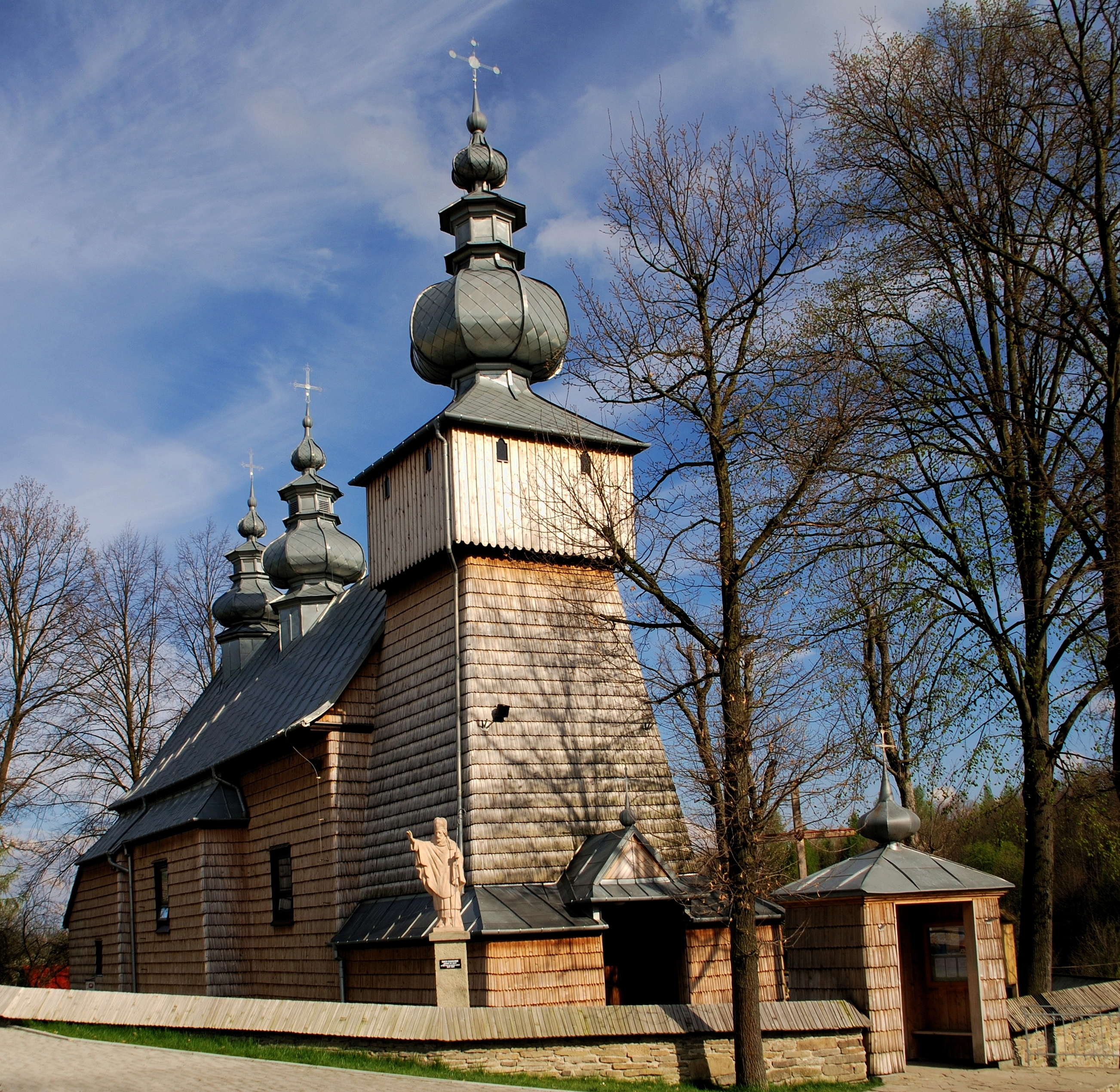 Binczarowa, Cerkiew św. Męczennika Dymitra w Binczarowej Wikidata has entry Q11689812 with data related to this item.